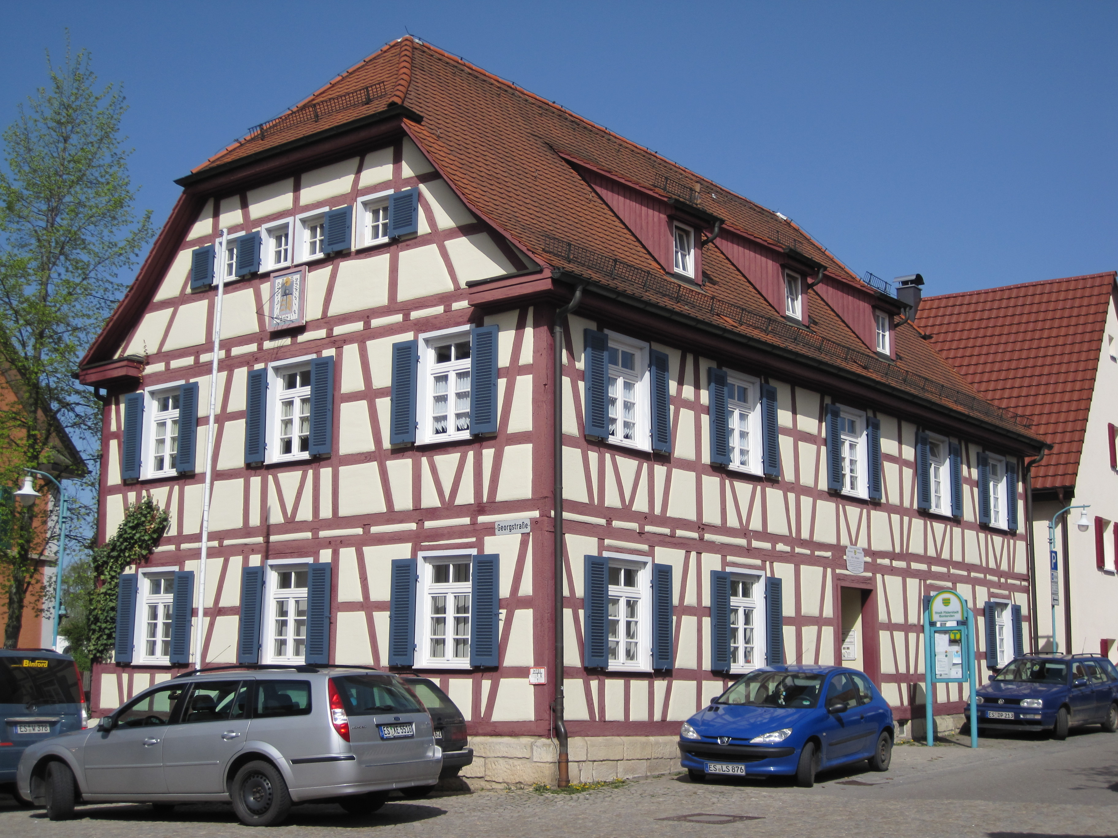 Alte Schule in Filderstadt-Bonlanden, 1770 bis 1773 erbaut. Oberdorfstraße 10